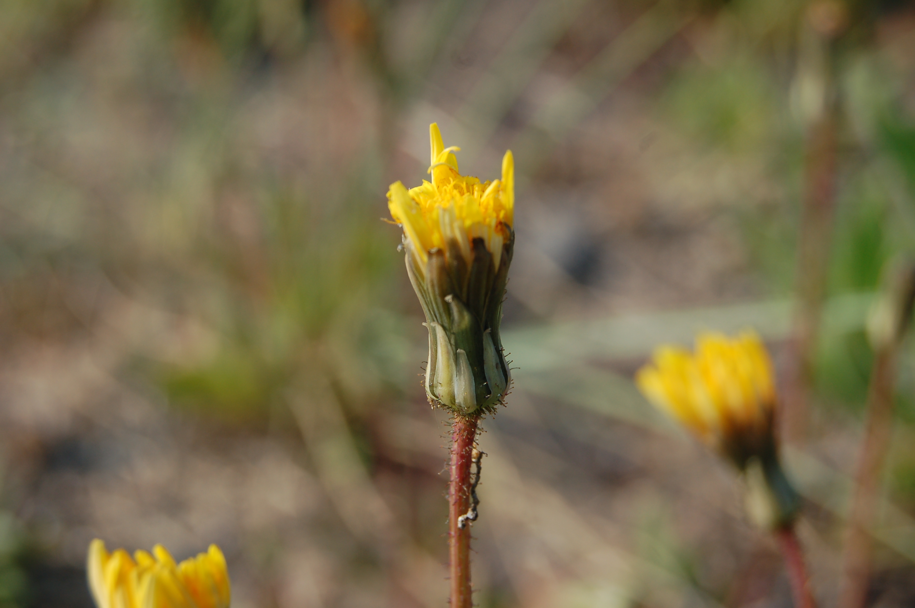 Aetheorhiza bulbosa, Torroella de Montgrí (Catalunya)